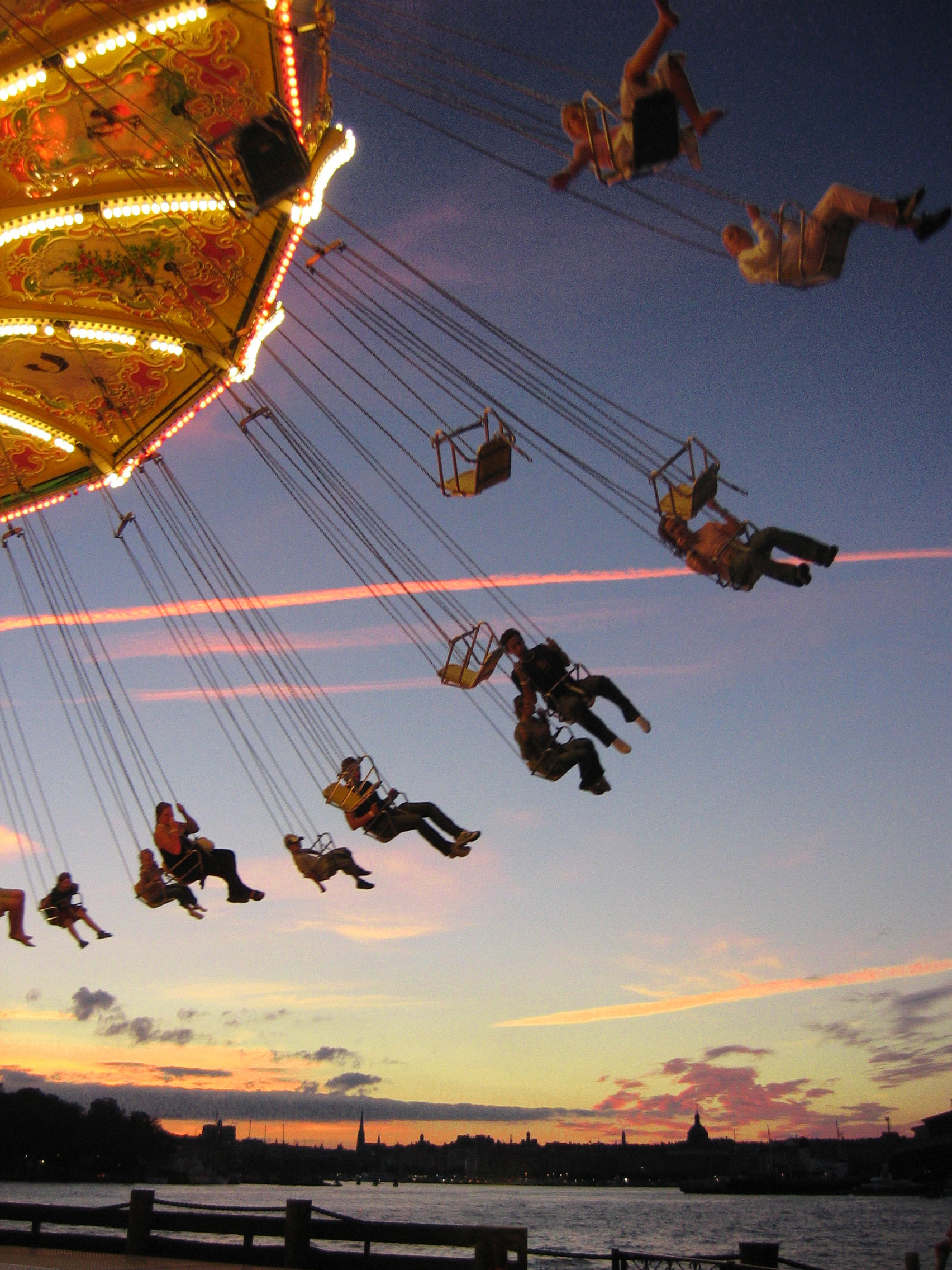 Kättingflygaren, ride in Gröna Lund, Stockholm